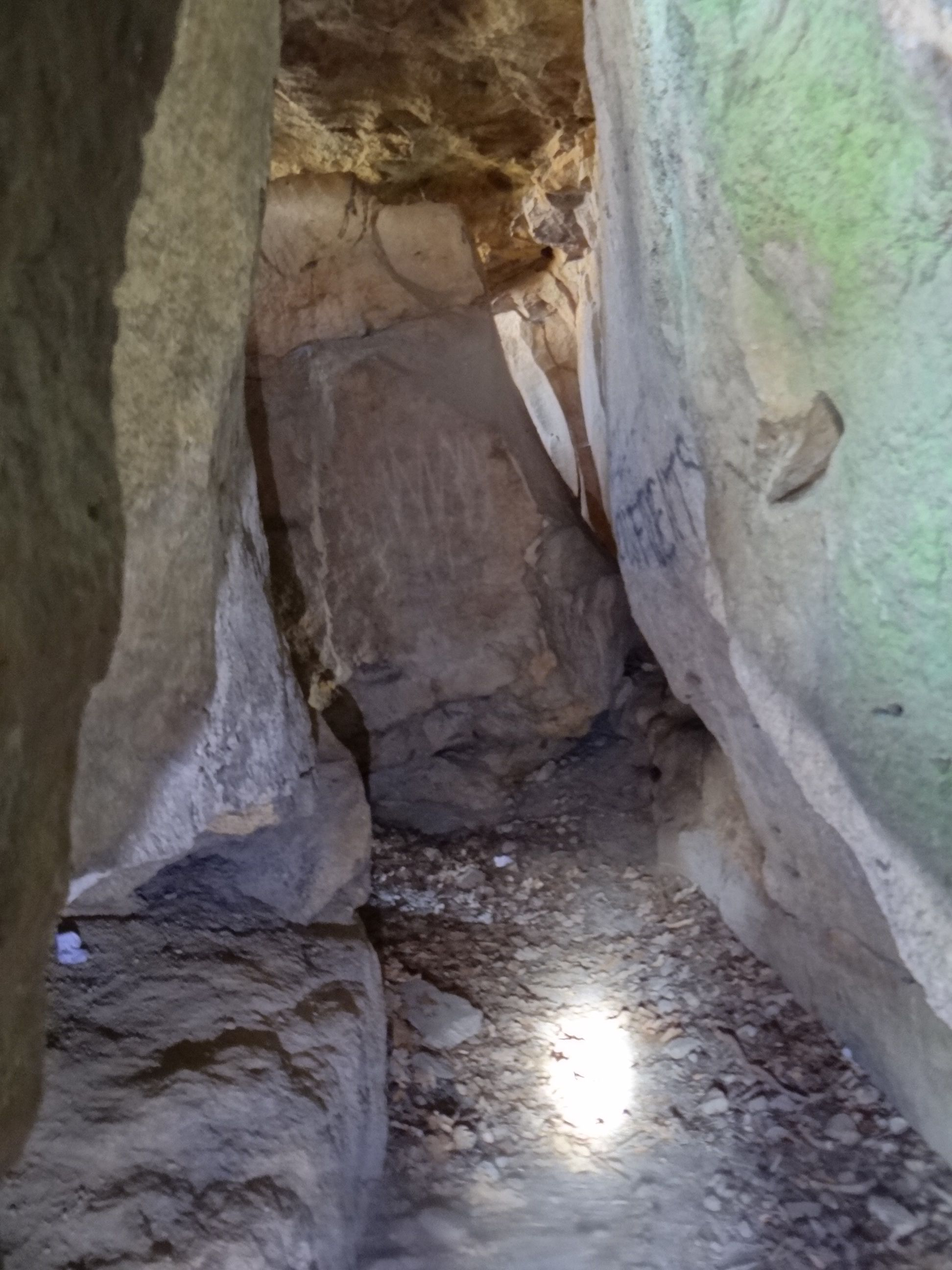 Jaskinia w Grunwaldzkiej Skale